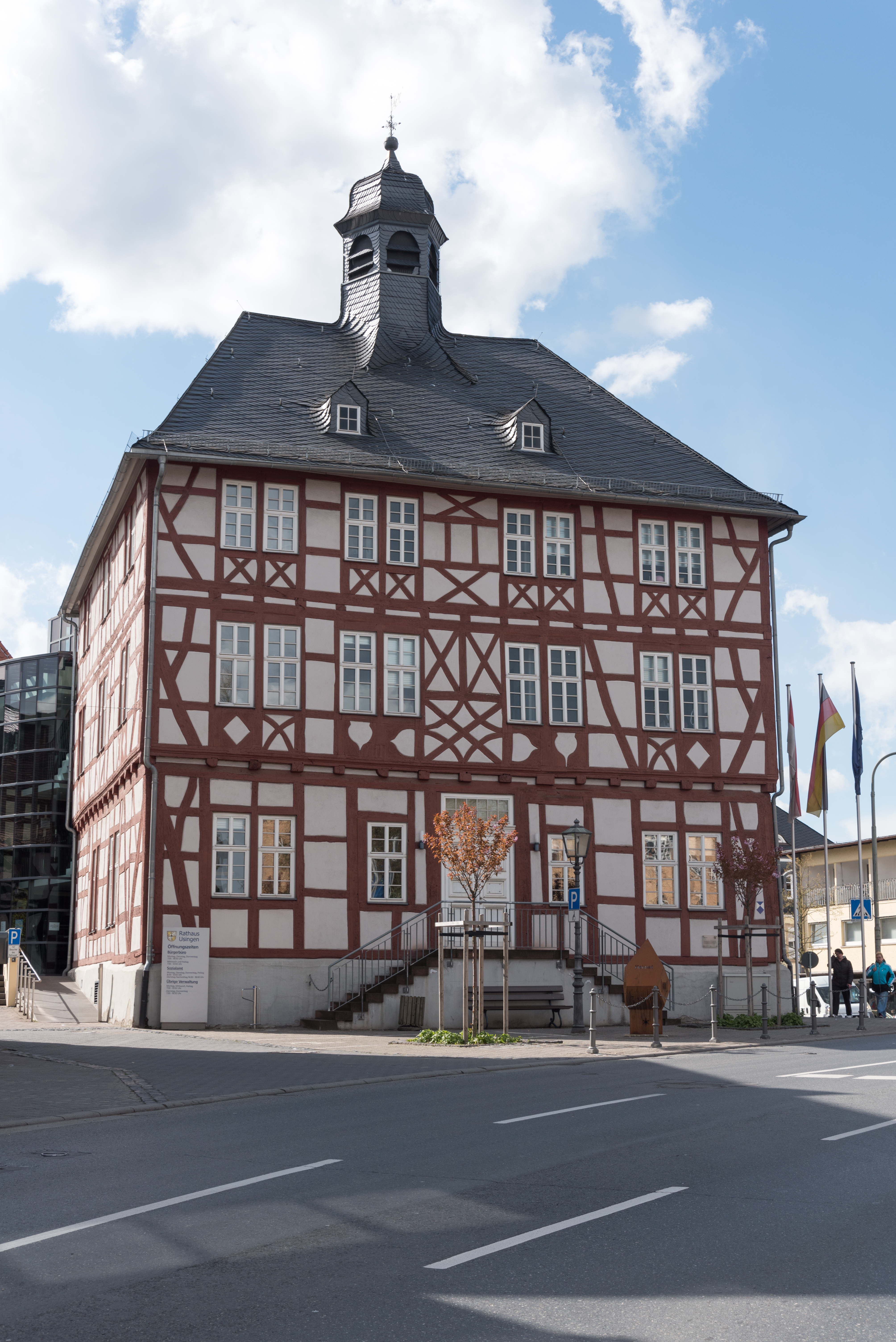 Usingen, Rathaus